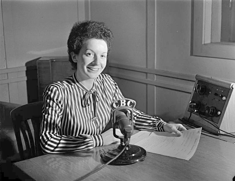 Claire Montreuil, alors annonceure à la radio de Radio-Canada (CBF), en studio à Montréal le 3 avril 1945. Elle est écrivaine sous le pseudonyme de Claire Martin.